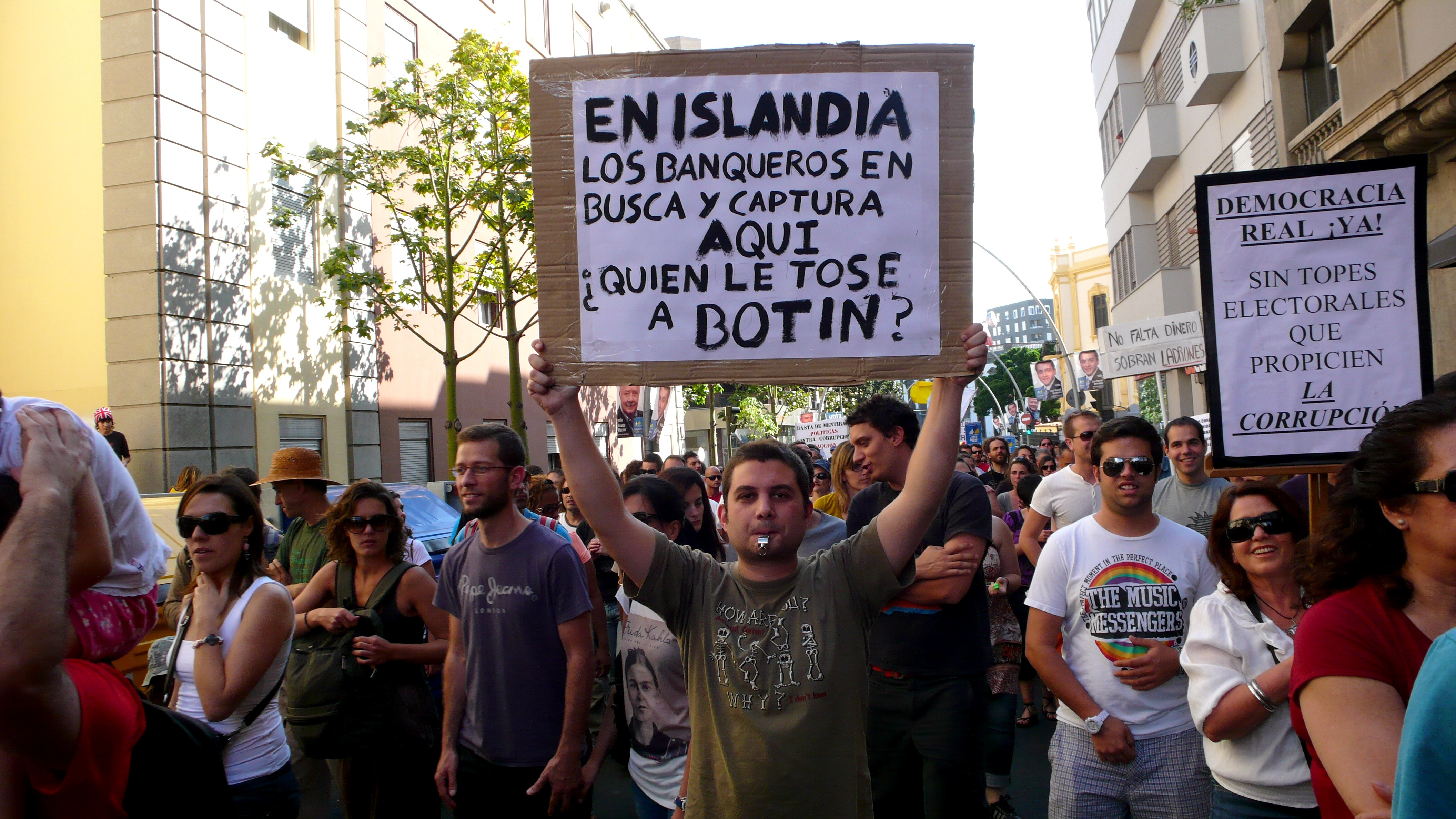 Manifestación de Democracia Real Ya en Santa Cruz de Tenerife. En la imagen se muestra una pancarta exaltando el ejemplo de Islandia.